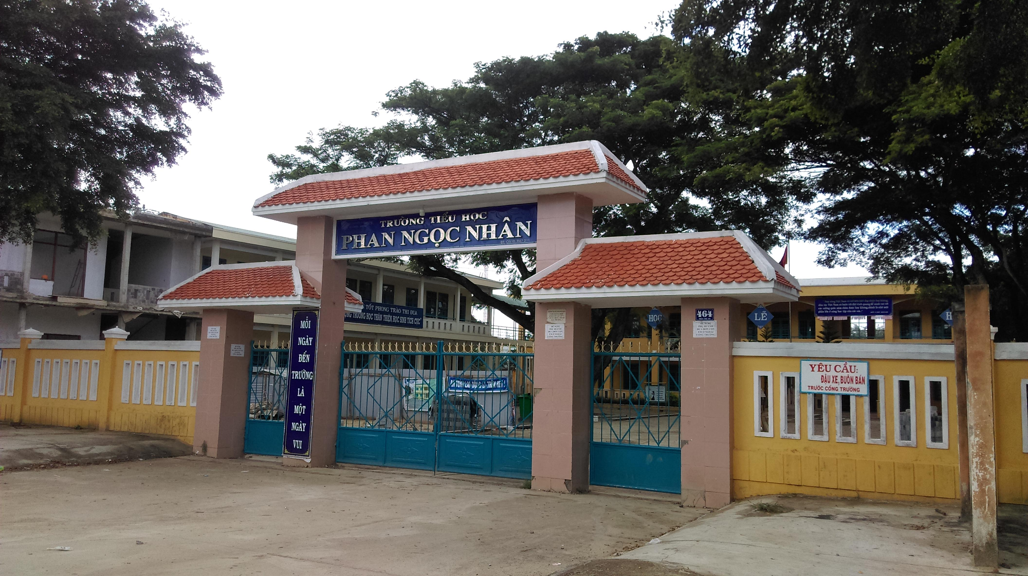 Trường Tiểu học Phan Ngọc Nhân, Điện Nam Bắc, Điện Bàn, Quảng Nam